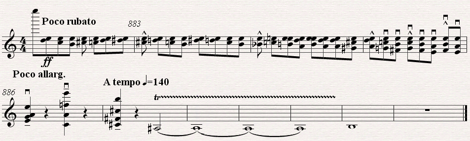 Bartók II. hegedűverseny I. tétel zárótéma